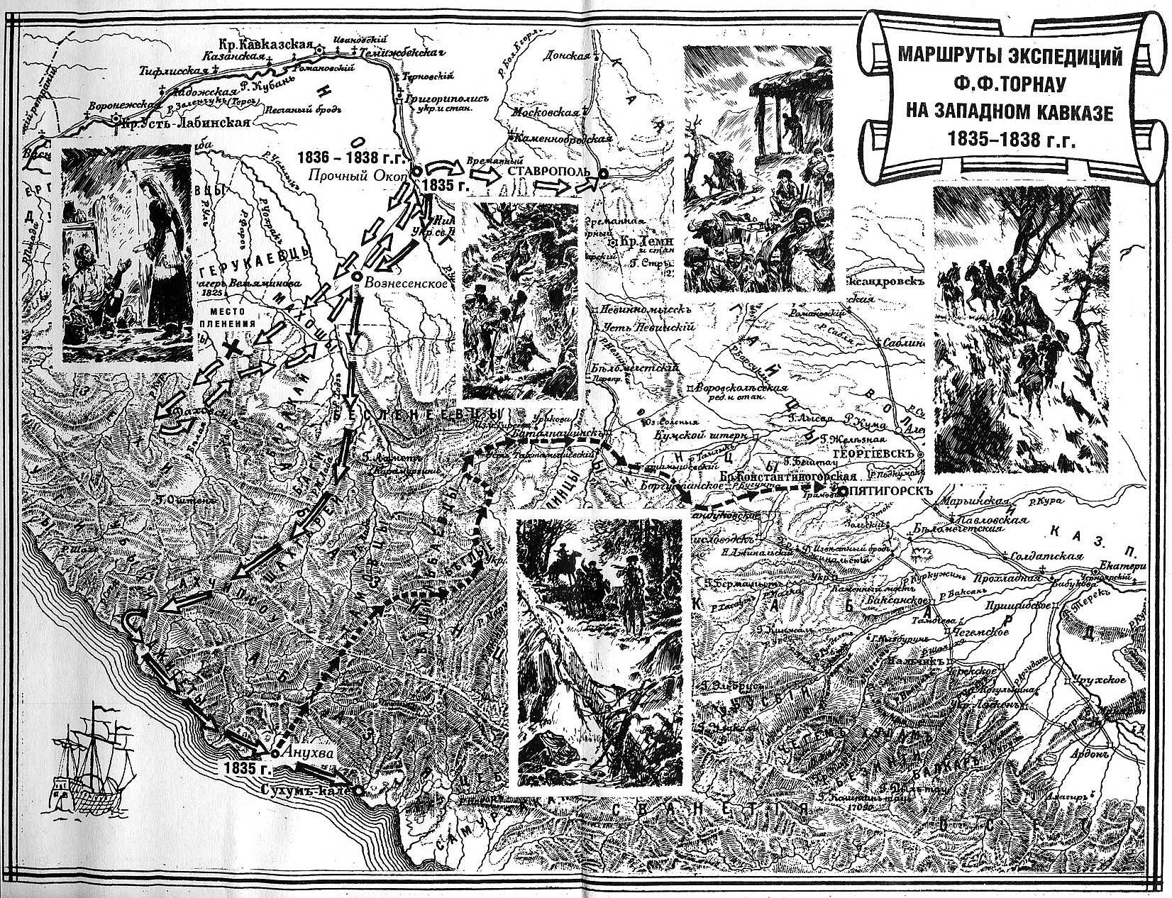 Карта путешествий русского разведчика Фёдора Фёдоровича Торнау во время Кавказской войны 1835-1838 гг